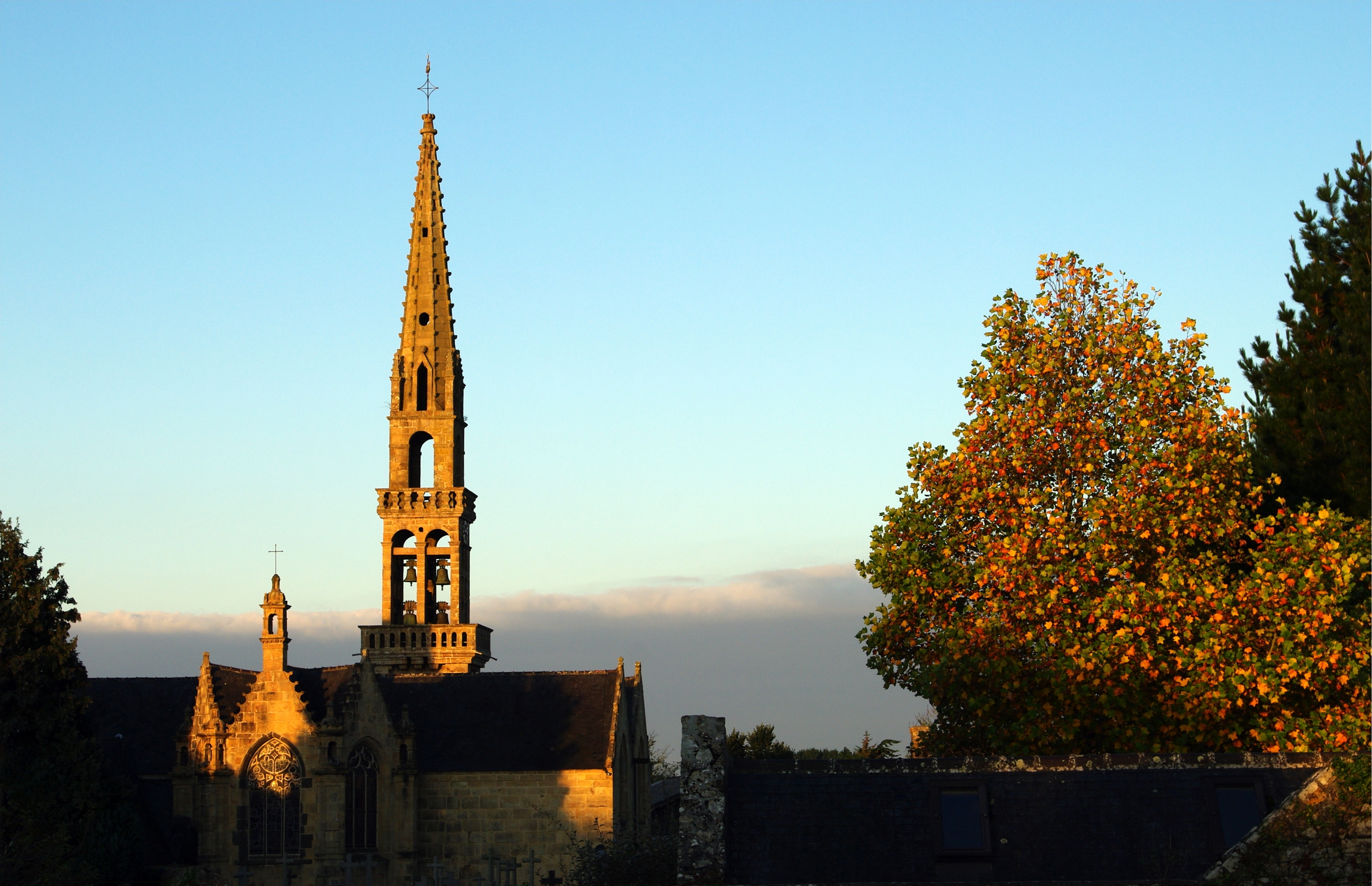 Logonna-Daoulas, église Saint-Monna.JPG